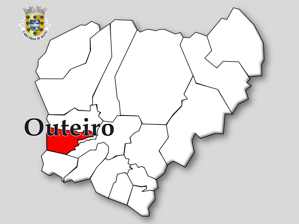 Censos 1864/2011